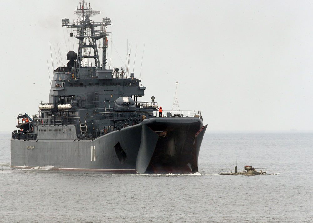 Масштабное учение 336-й отдельной гвардейской Белостокской орденов Суворова и Александра Невского бригады морской пехоты Балтийского флота в Калининградской области.